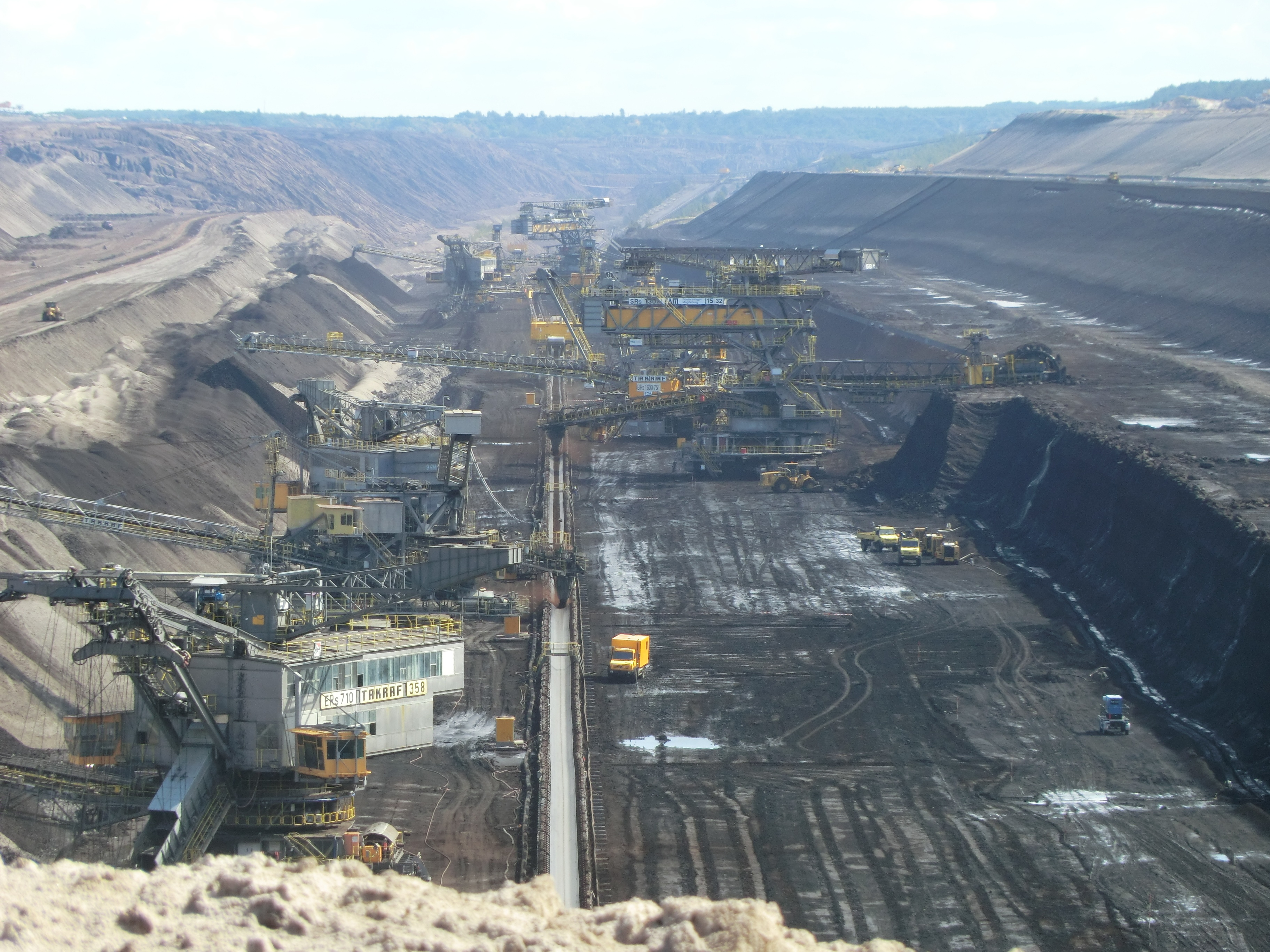 Blick in das Kohleflöz des Braunkohle Tagebau Welzow Süd